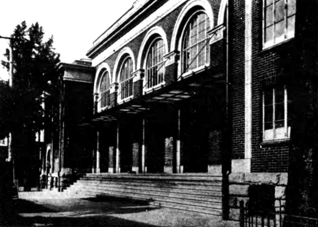 青山会館の外観